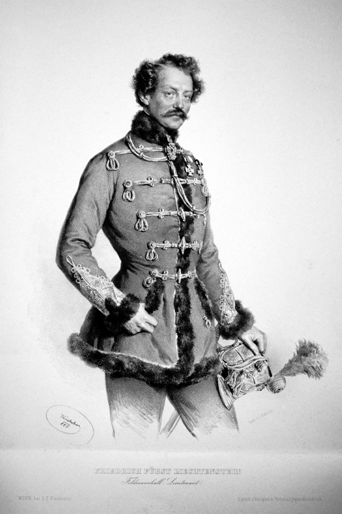 Friedrich Fürst zu Liechtenstein (1807-1885), k. k. General der Kavallerie